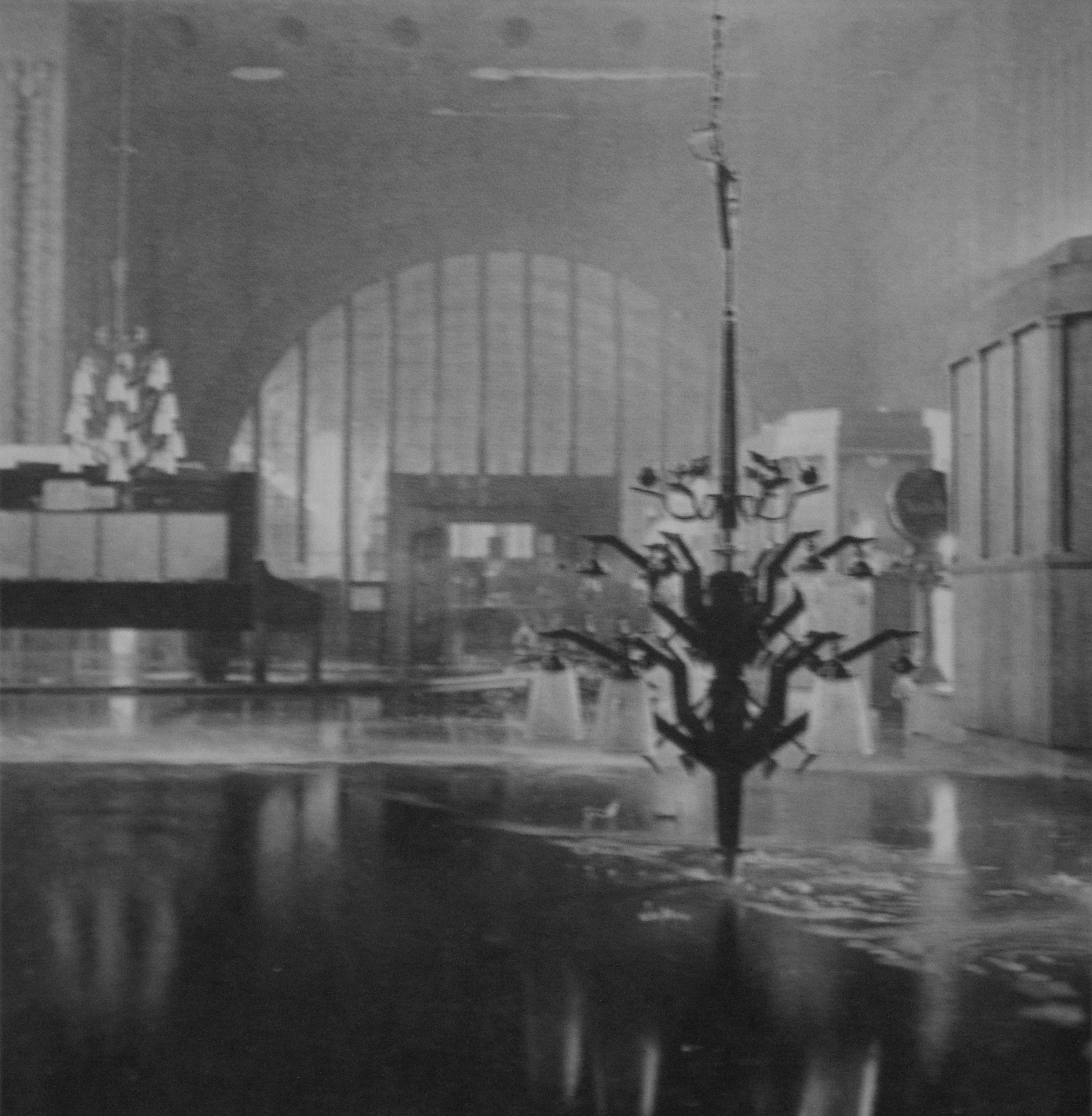 Helsingin rautatieasema 14.5.1950 sattuneen tulipalon jälkeen.